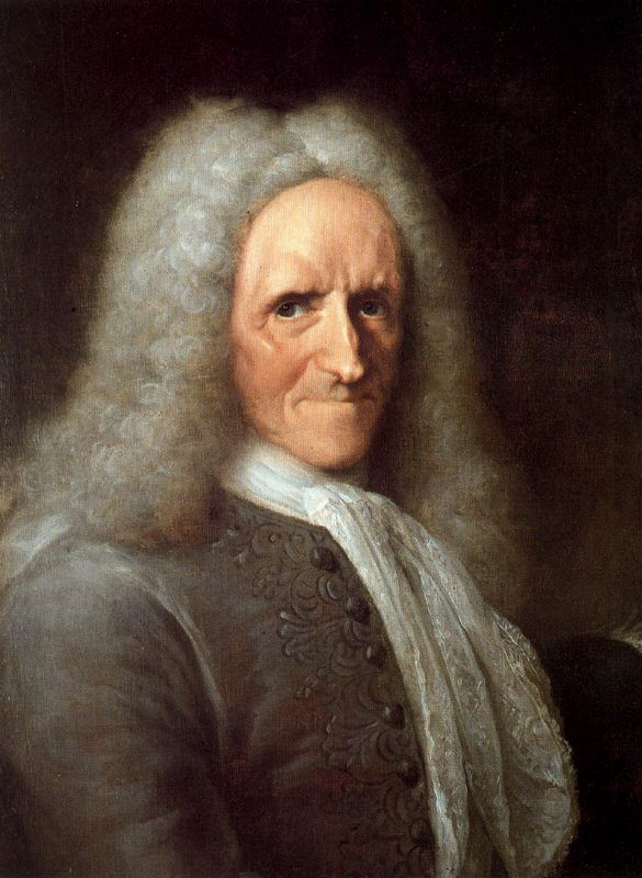 Retrato del aristócrata y funcionario español Francisco Antonio de Salcedo y Aguirre (1646-1729), primer marqués de Vadillo y corregidor de Madrid.